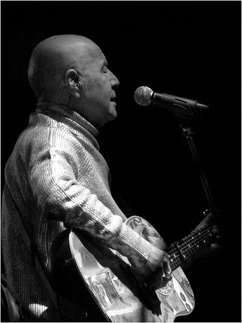 Mazhar Alanson